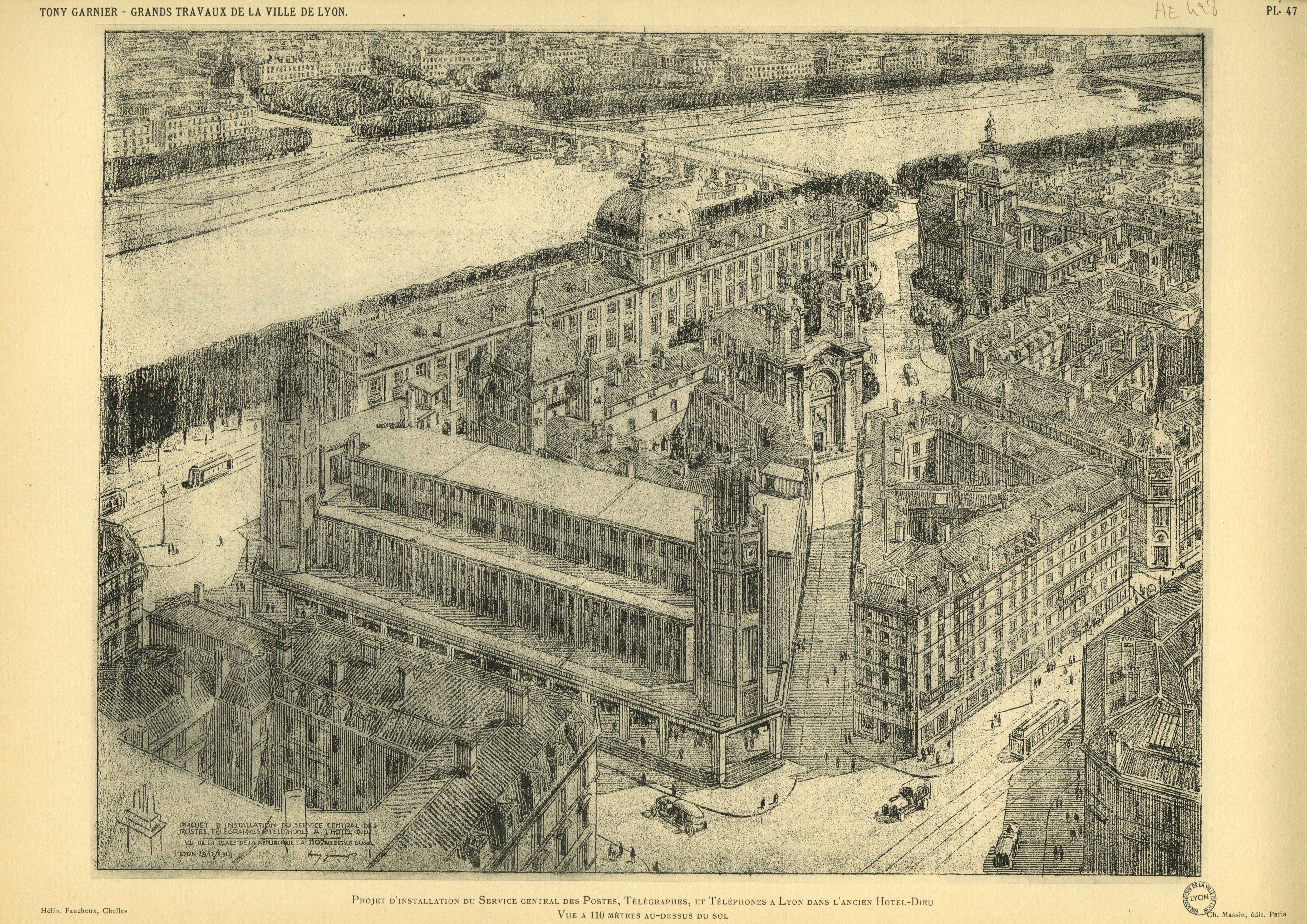 Projet d'installation des P.T.T. à Lyon dans l'ancien hôpital Hôtel-Dieu, dessin de Tony Garnier (pl. 47) du recueil "Les grands travaux de la ville de Lyon [Livre] : études, projets et travaux exécutés (hôpitaux, écoles, postes, abattoirs, habitations en commun, stade, etc.)" en 1921 : vue à 110 mètres au dessus du sol en noir et blanc.